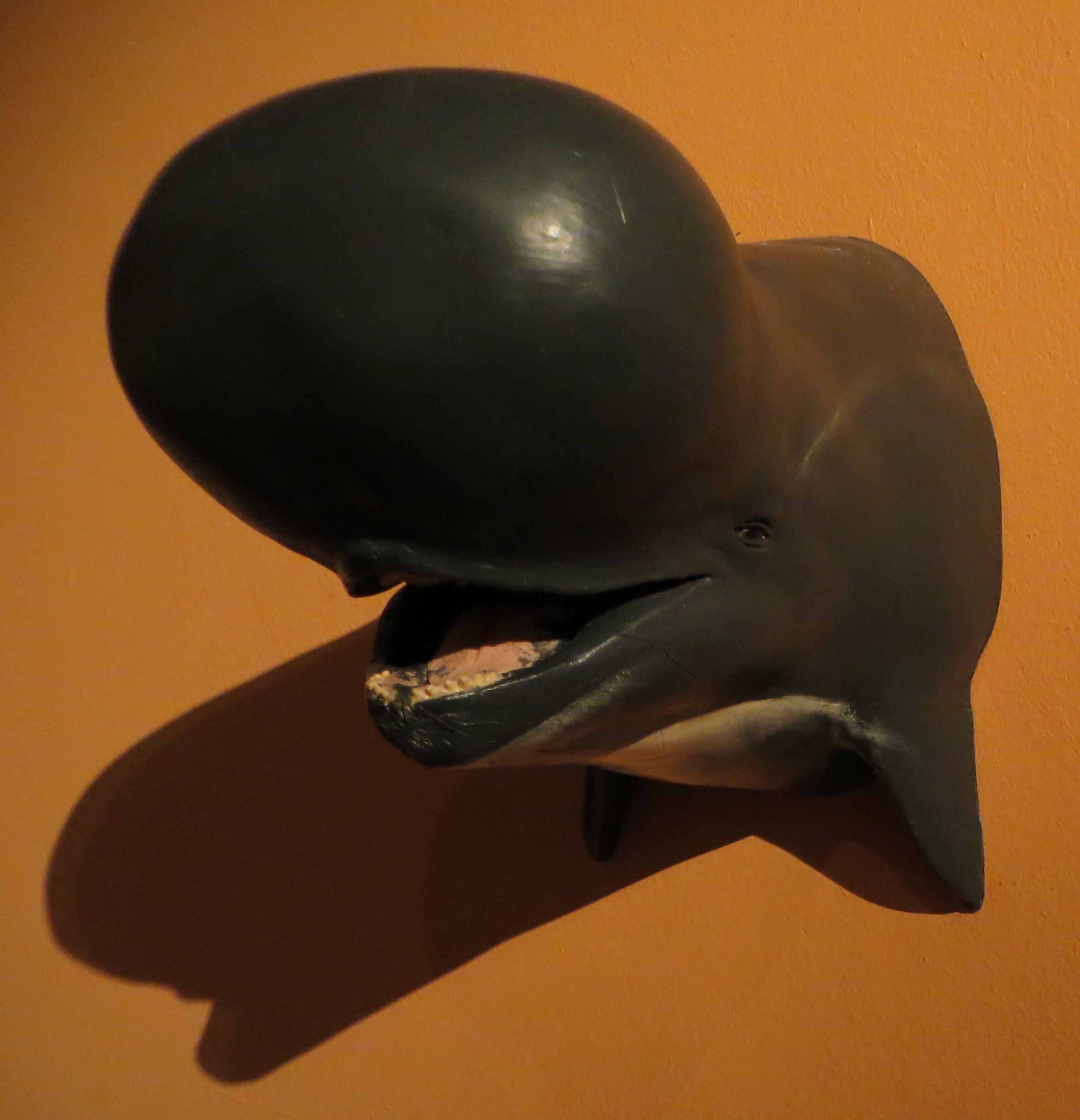 Reconstruction of Platalearostrum - Took the picture at Museum of Natural History, Rotterdam